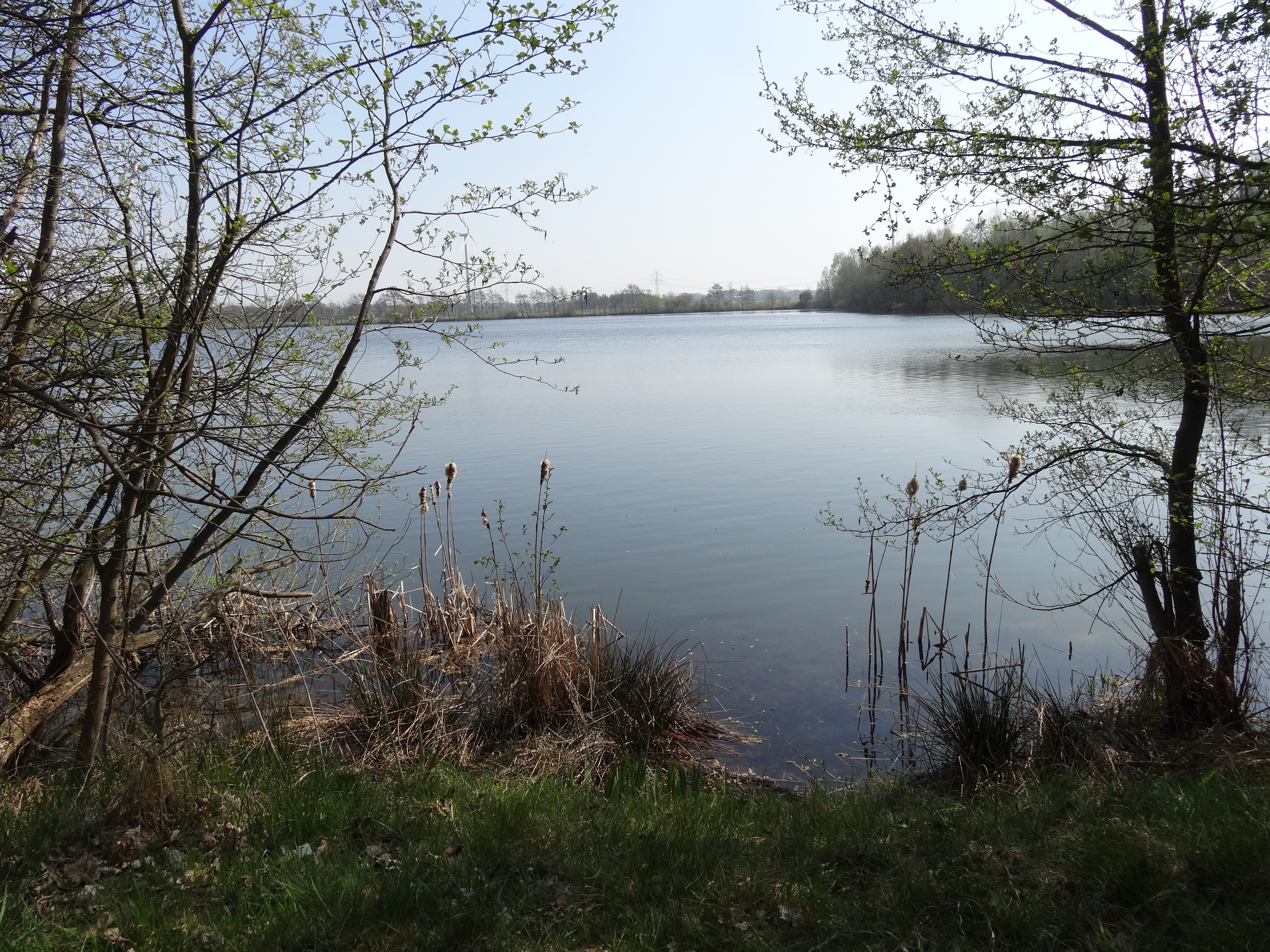 Impressionen Frühjahr 2013 Naturschutzgebiet "Baggersee Hohenfelde"